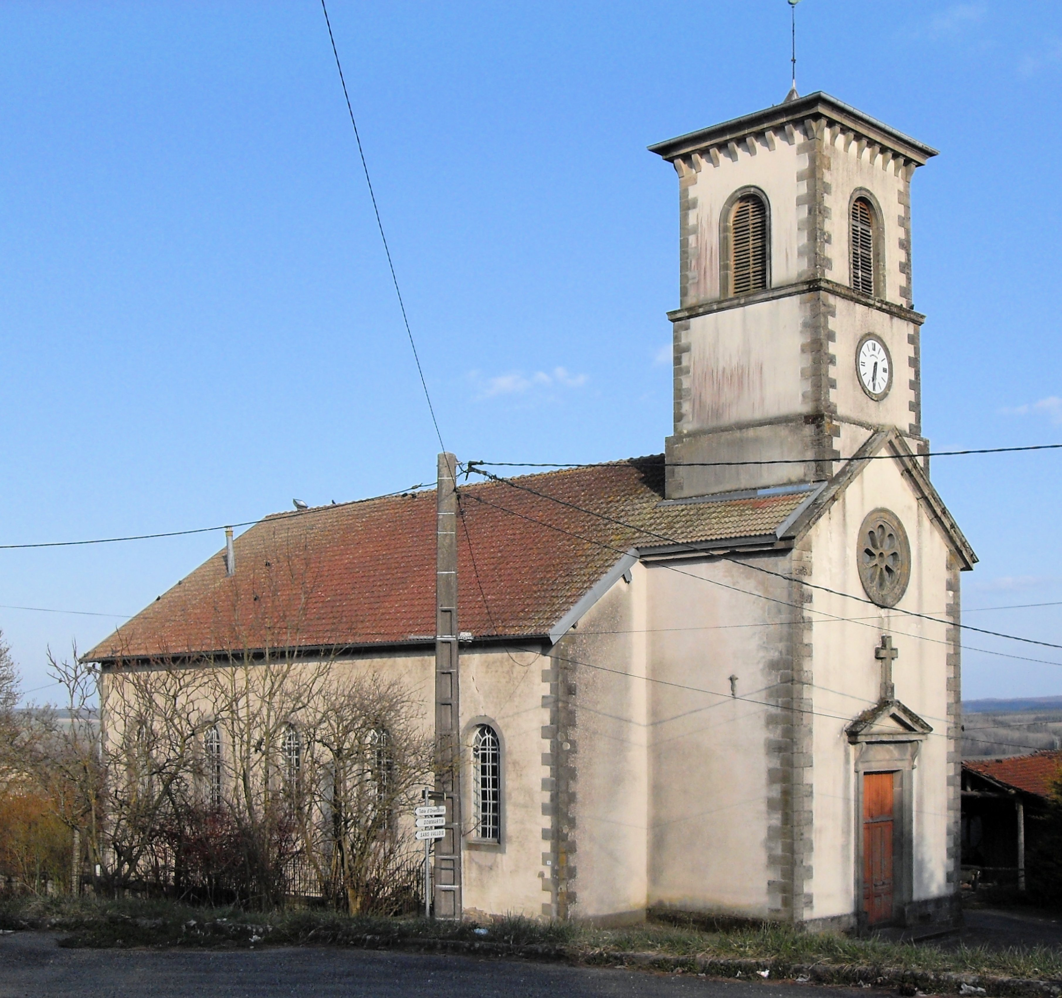 L'église Saint-Christophe àJésonville